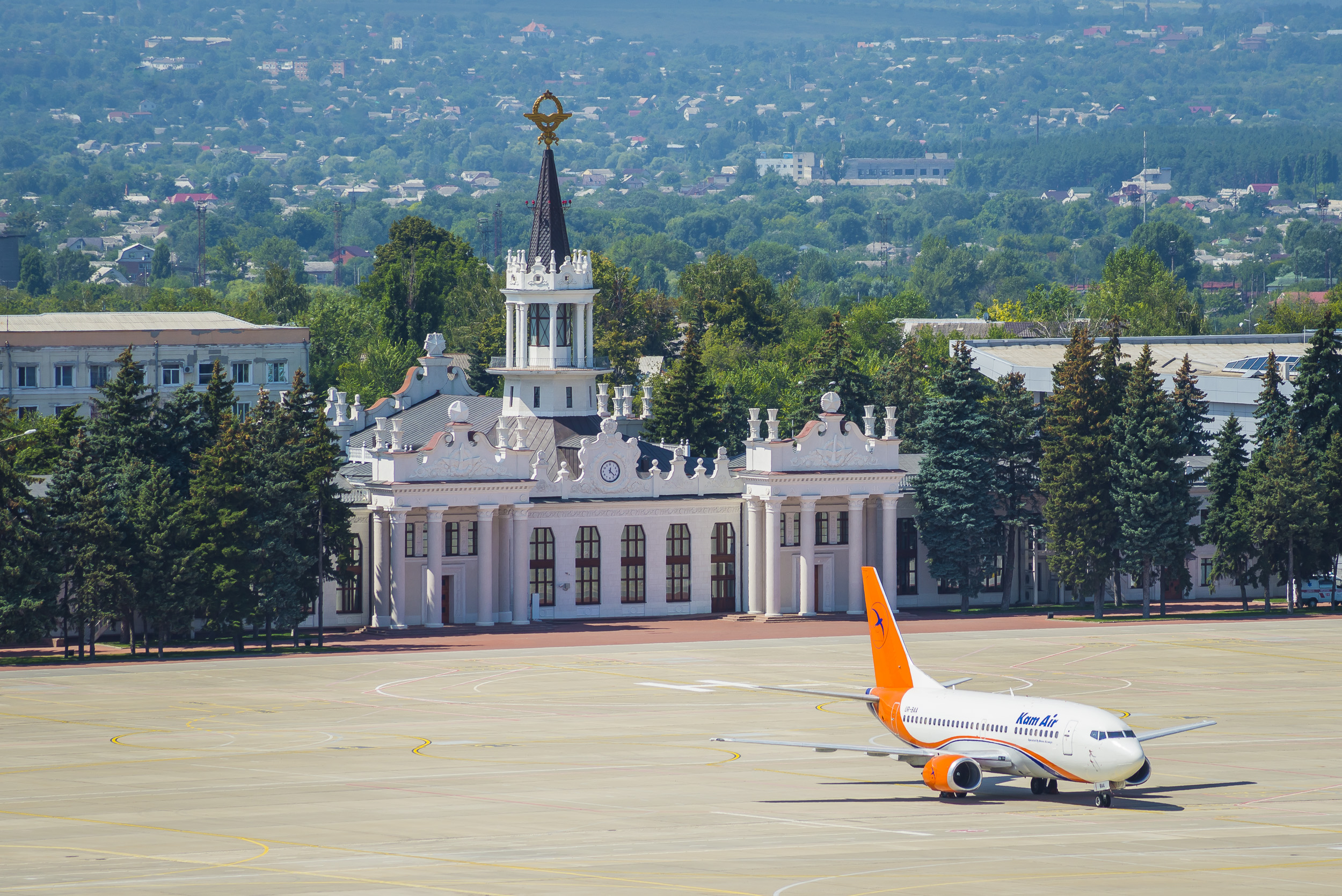 Будинок «Аеровокзал», Харків, вул. Ромашкіна, 1 (просп. Гагаріна)